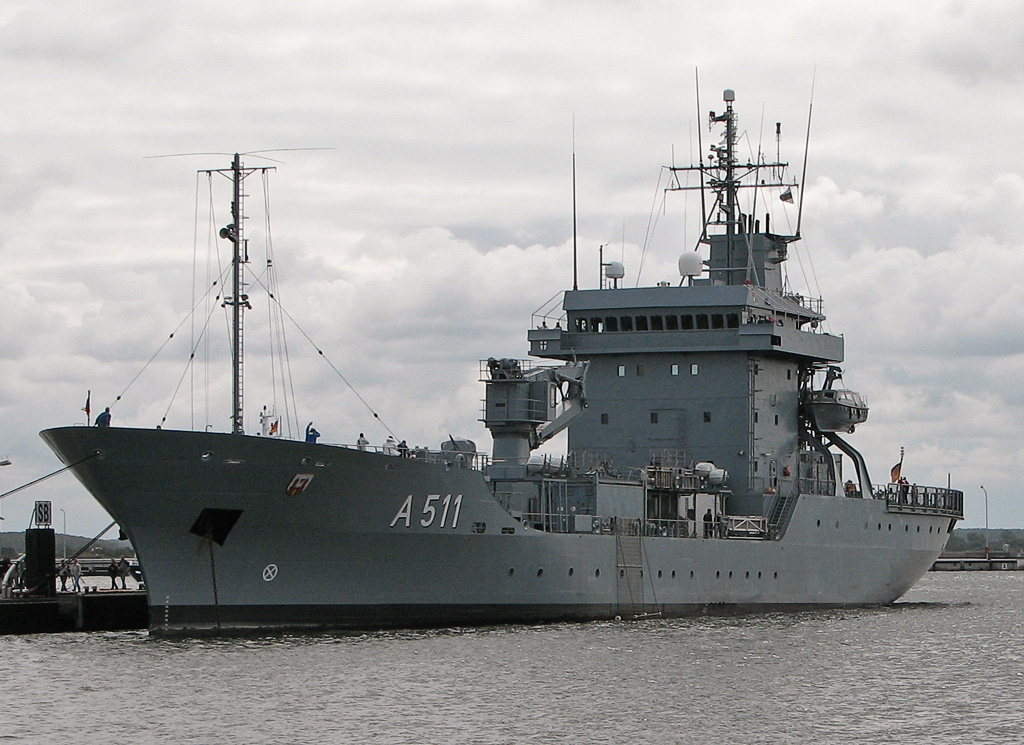 Beschreibung: Tender Elbe / A5161 / Marinestützpunkt Hohe Düne Fotograf: Darkone, 13. August 2005